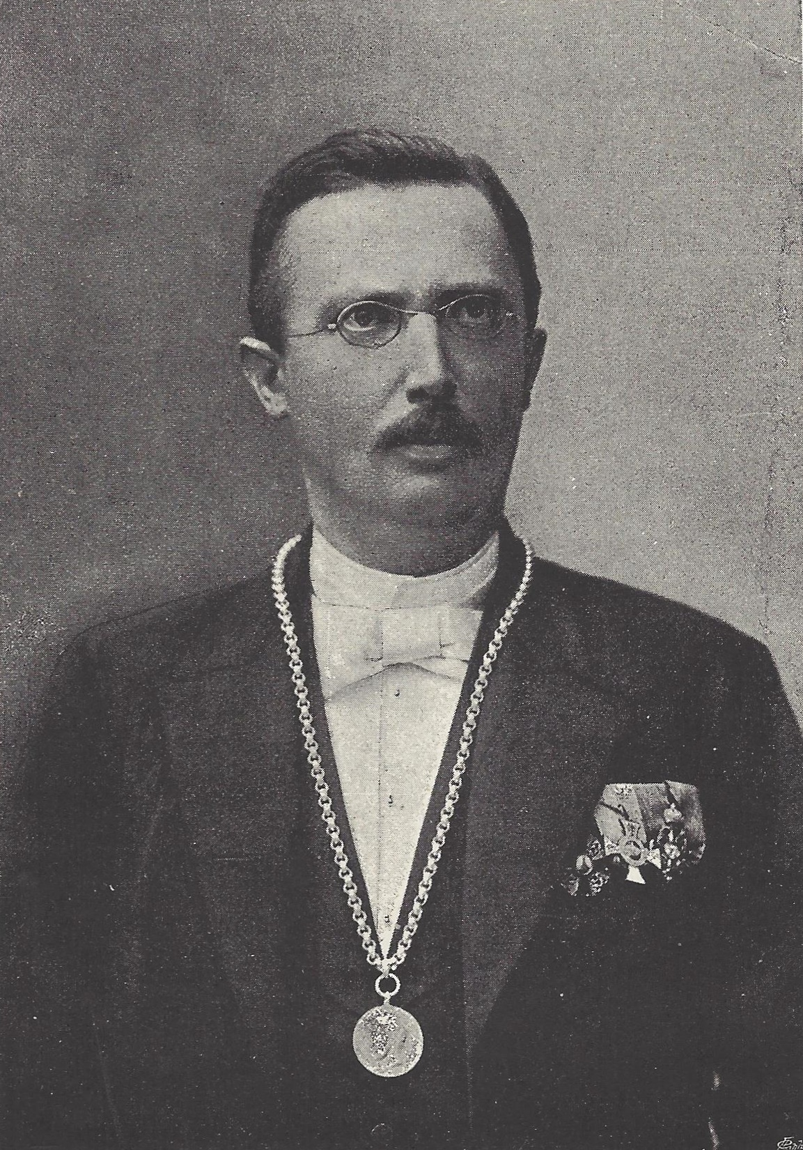 Porträtfotografie von Karl Wilckens